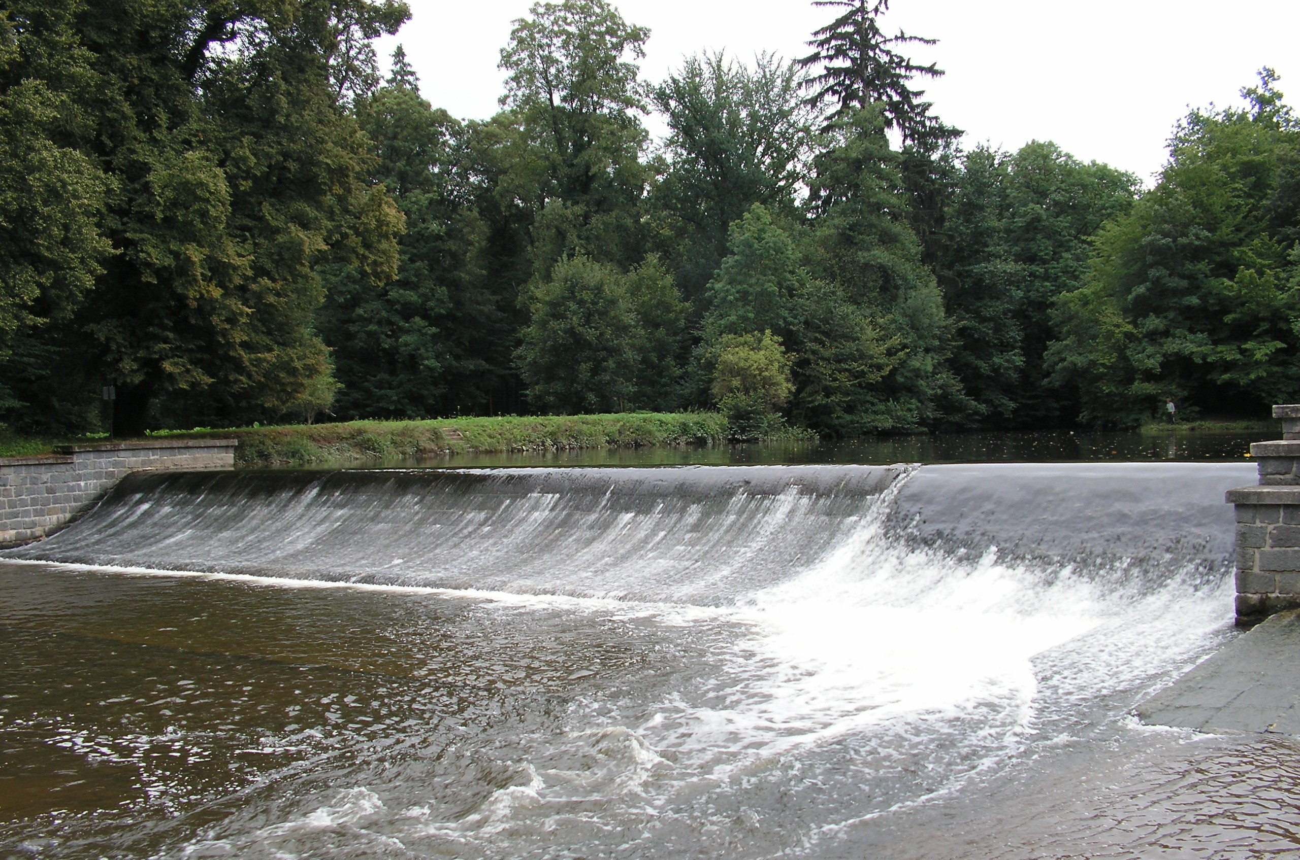 Doubrava ve Žlebech pod ústím Hostačovky